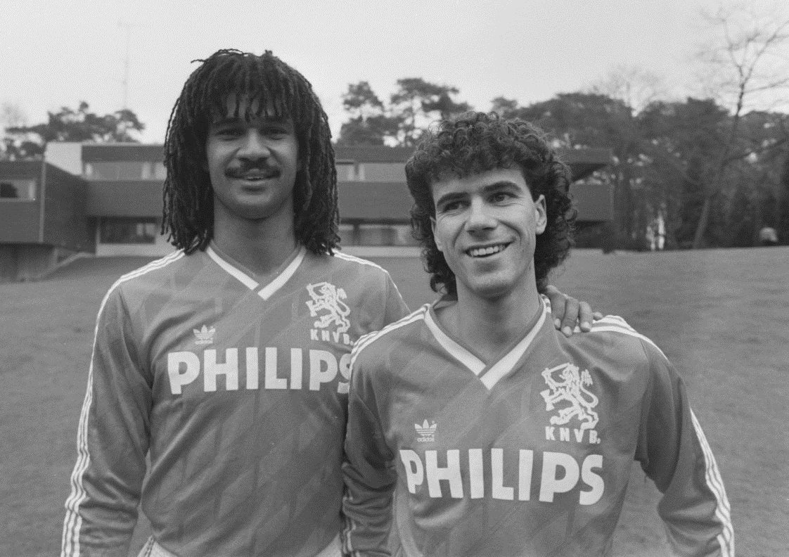 Selectie Nederlands elftal in Zeist; Ruud Gullit en debutant Peter Bosz.